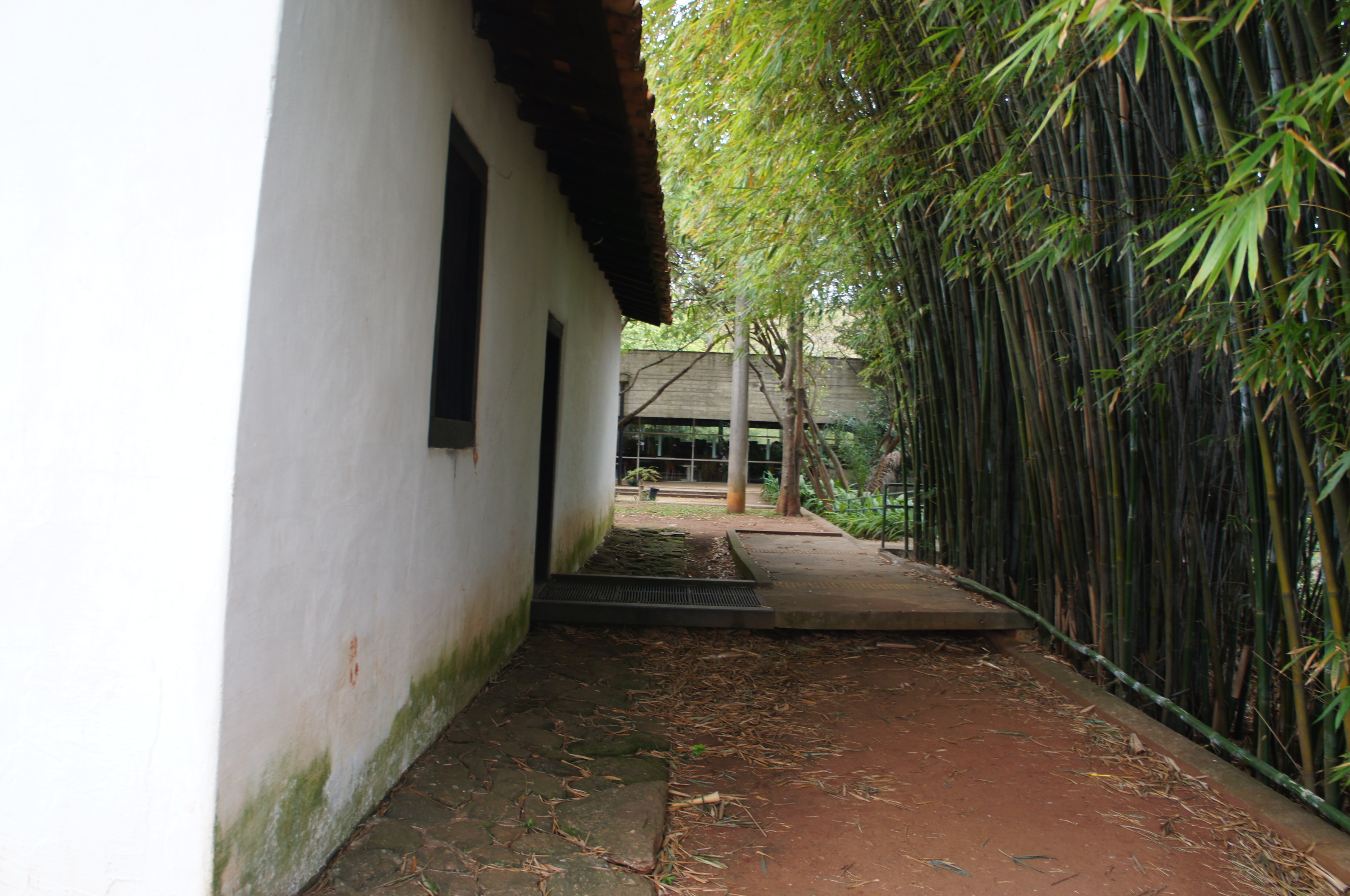 Face sul da Casa Sítio da Ressaca, em São Paulo (SP), Brasil.